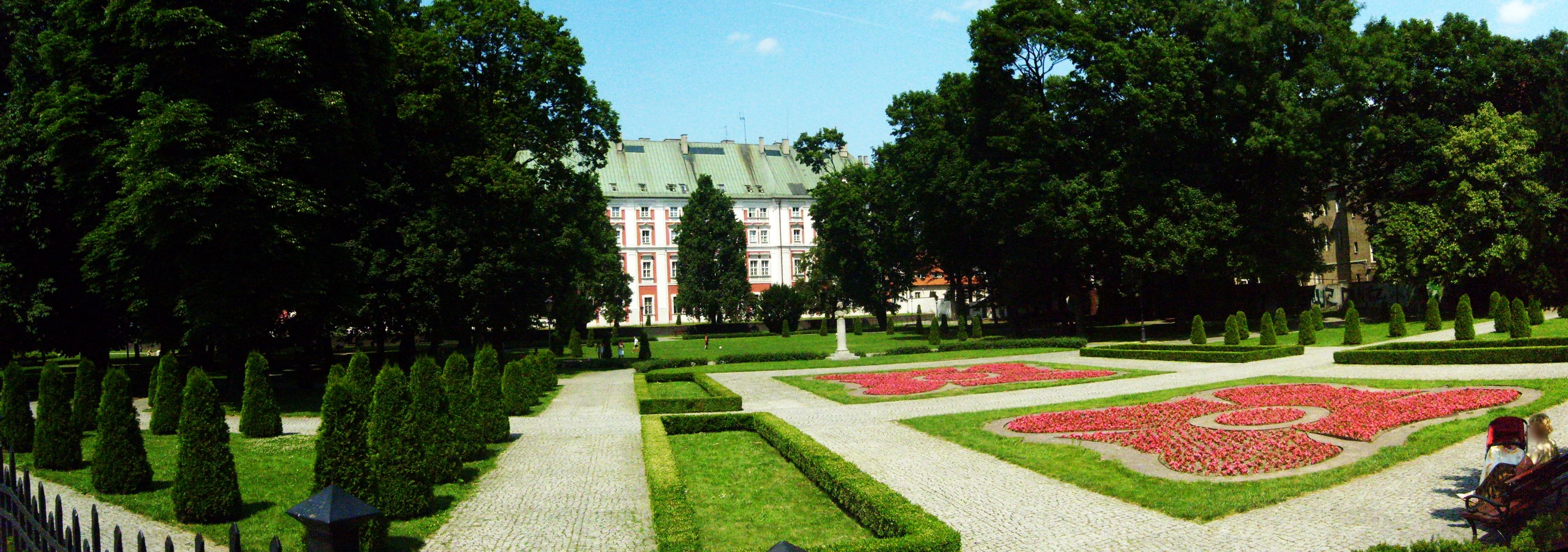 Poznań, Park Chopina latem